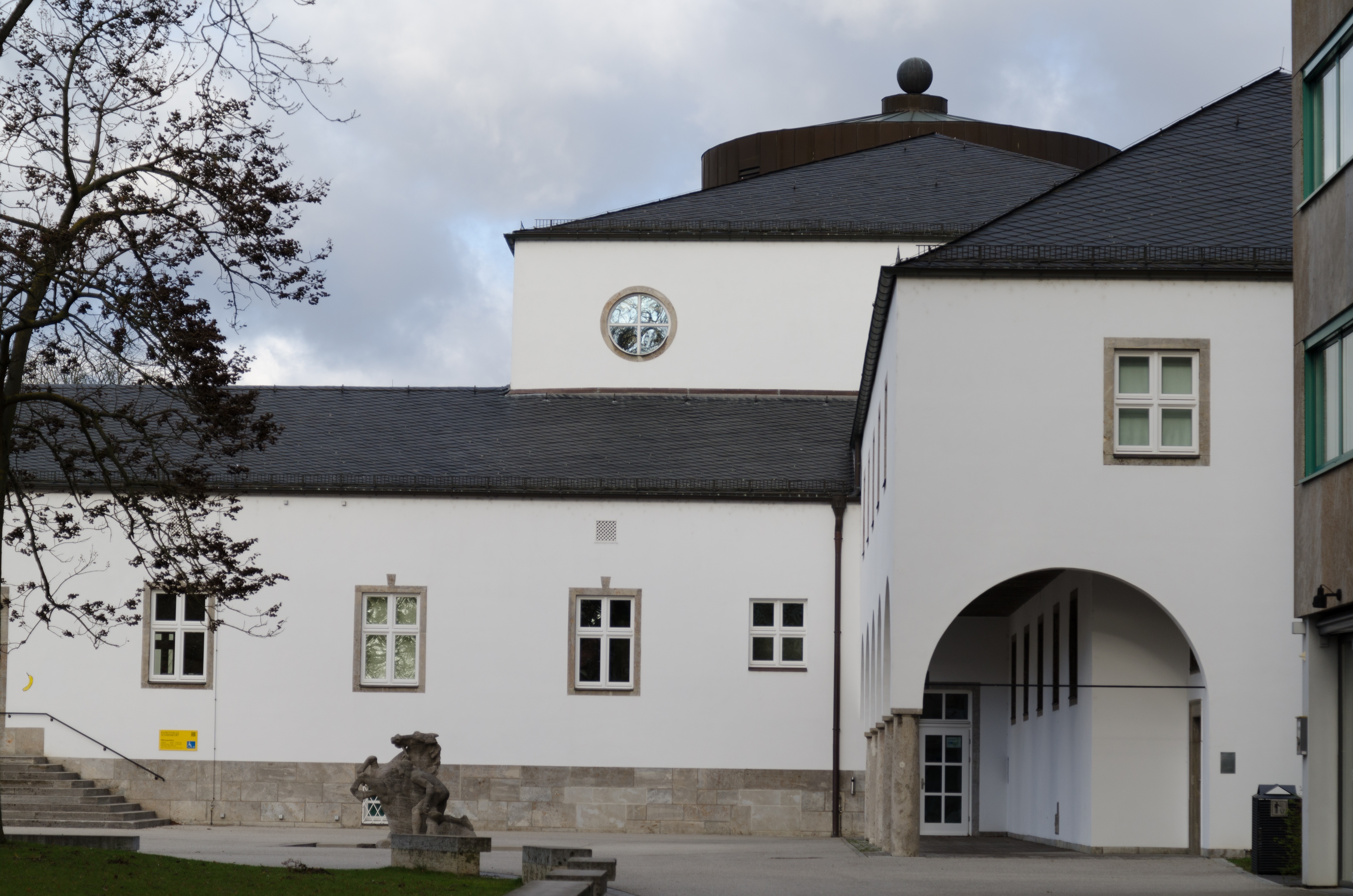 Schweinfurt, Kunsthalle Ernst Sachs Bad